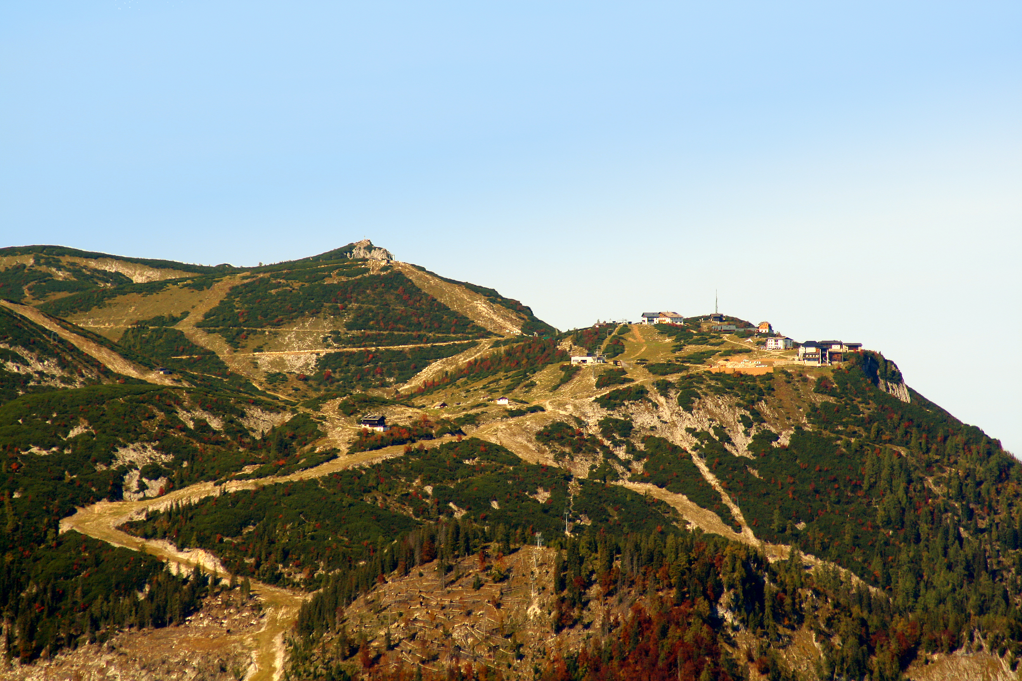 Blick auf den Feuerkogel vom Eibenberg aus